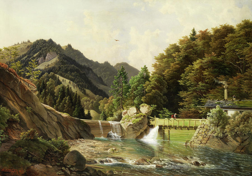 Blick vom felsigen Flussufer zu einer im rechten Winkel errichteten Schleusenanlage zwischen Felsen, dahinter Bauernhaus mit Holzschindel- und Steinlegedach mit rauchendem Kamin, davor eine Frau beim Wäschewaschen. Im Hintergrund hochziehender, bewaldeteter Berghang mit Almenwiesen unter Wolkenhimmel.